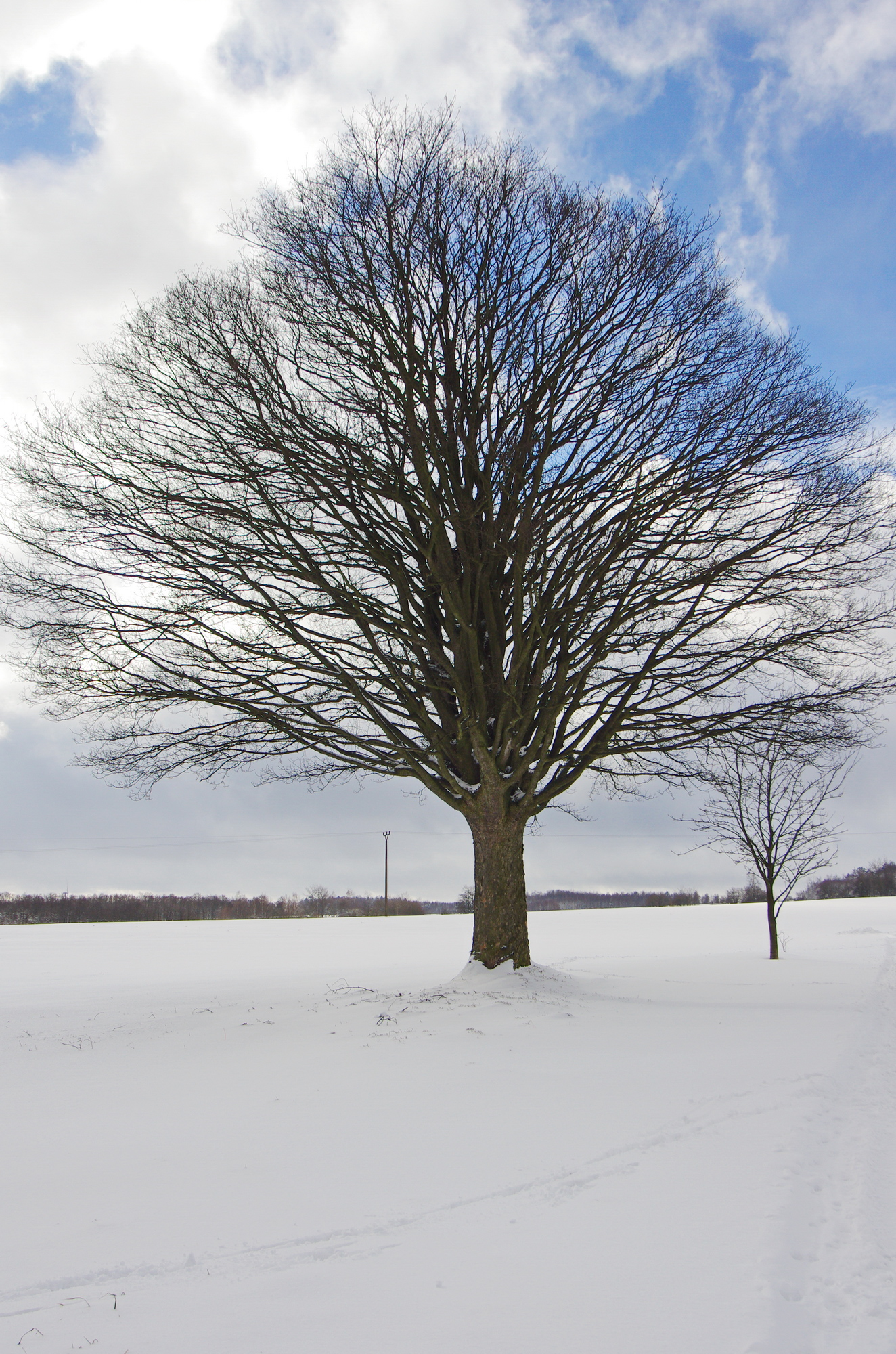 památný strom Klen u Krajkové, okres Sokolov